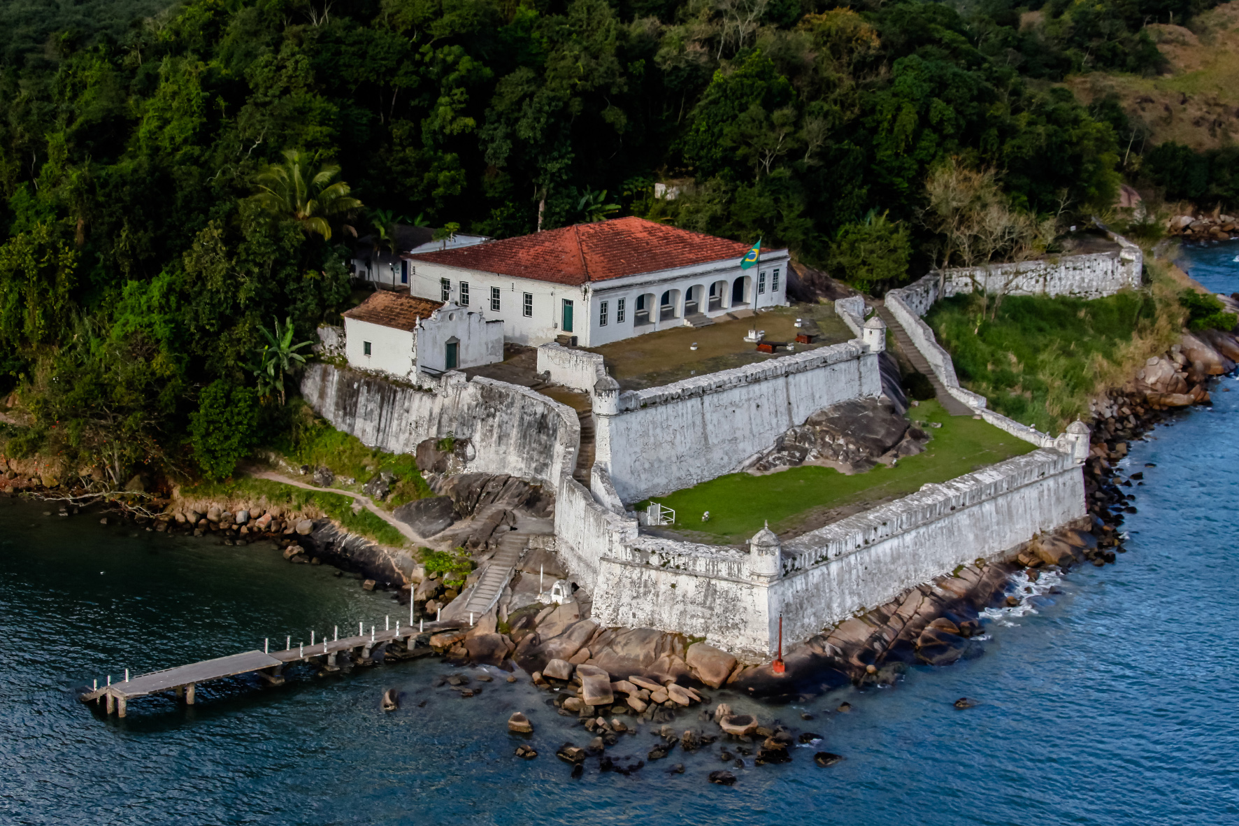 Forte da Barra Grande, inclusive o Fortim da Praia do Góis, o Portão Espanhol e toda a área que os envolve